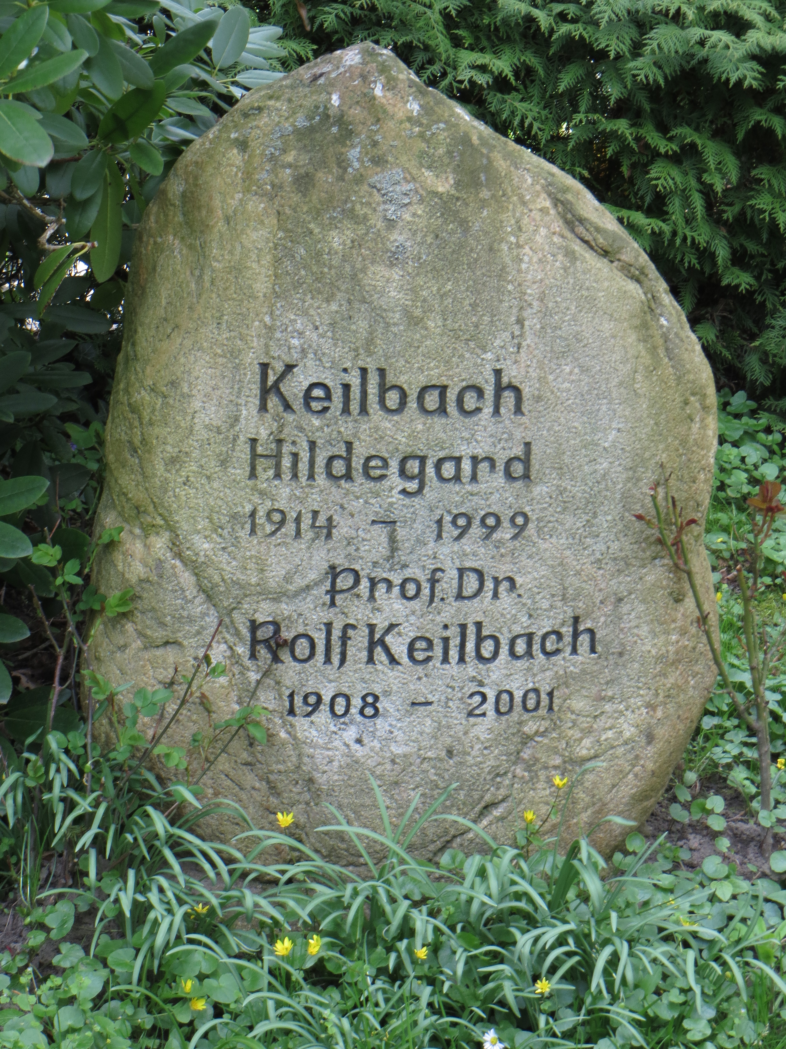 Greifswald, Alter Friedhof